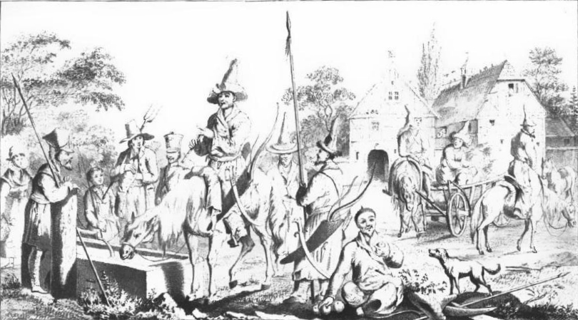 Baschkieren in Zittau Herbst 1813